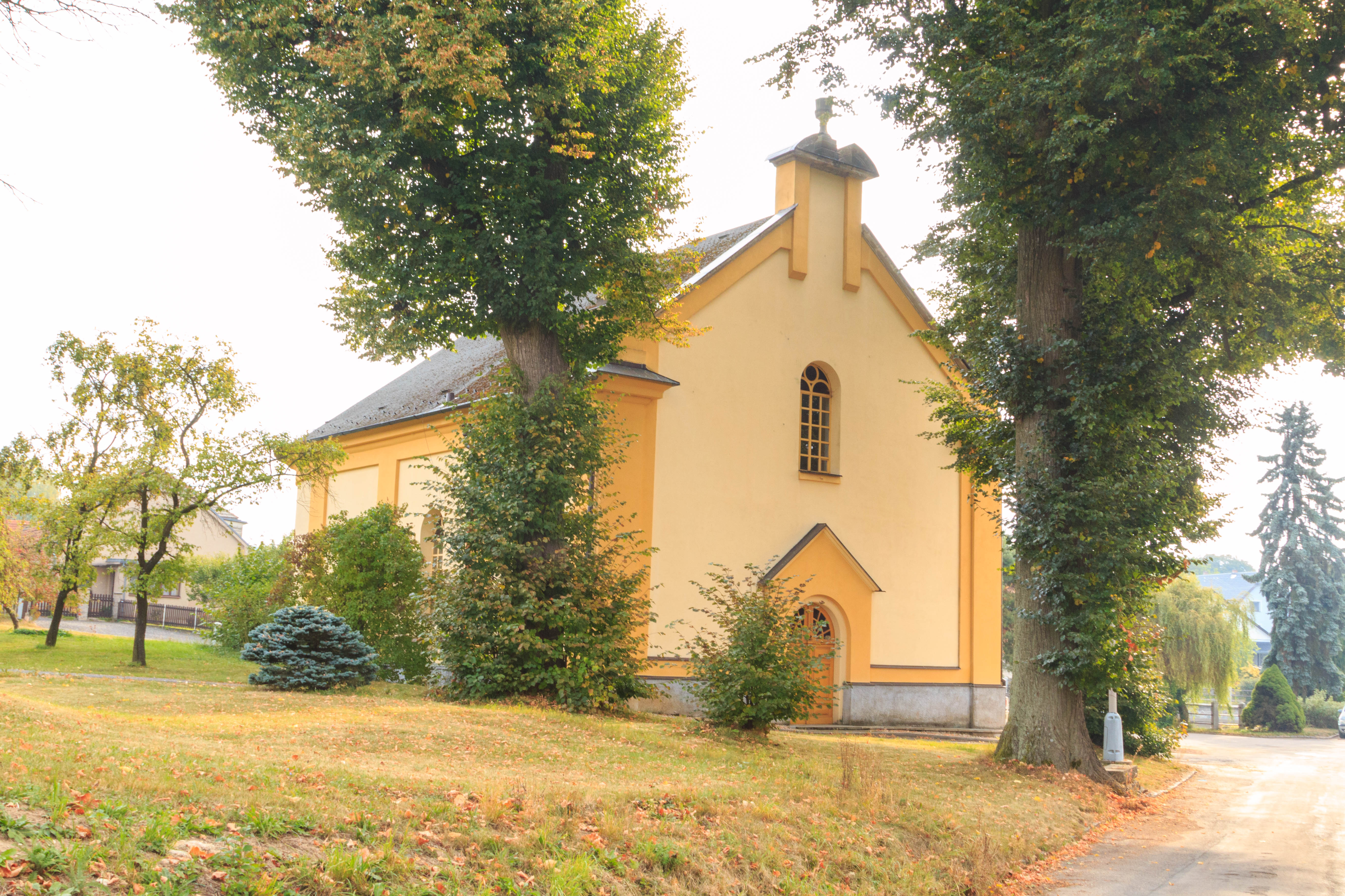 Evangelický kostel, Džbánov.